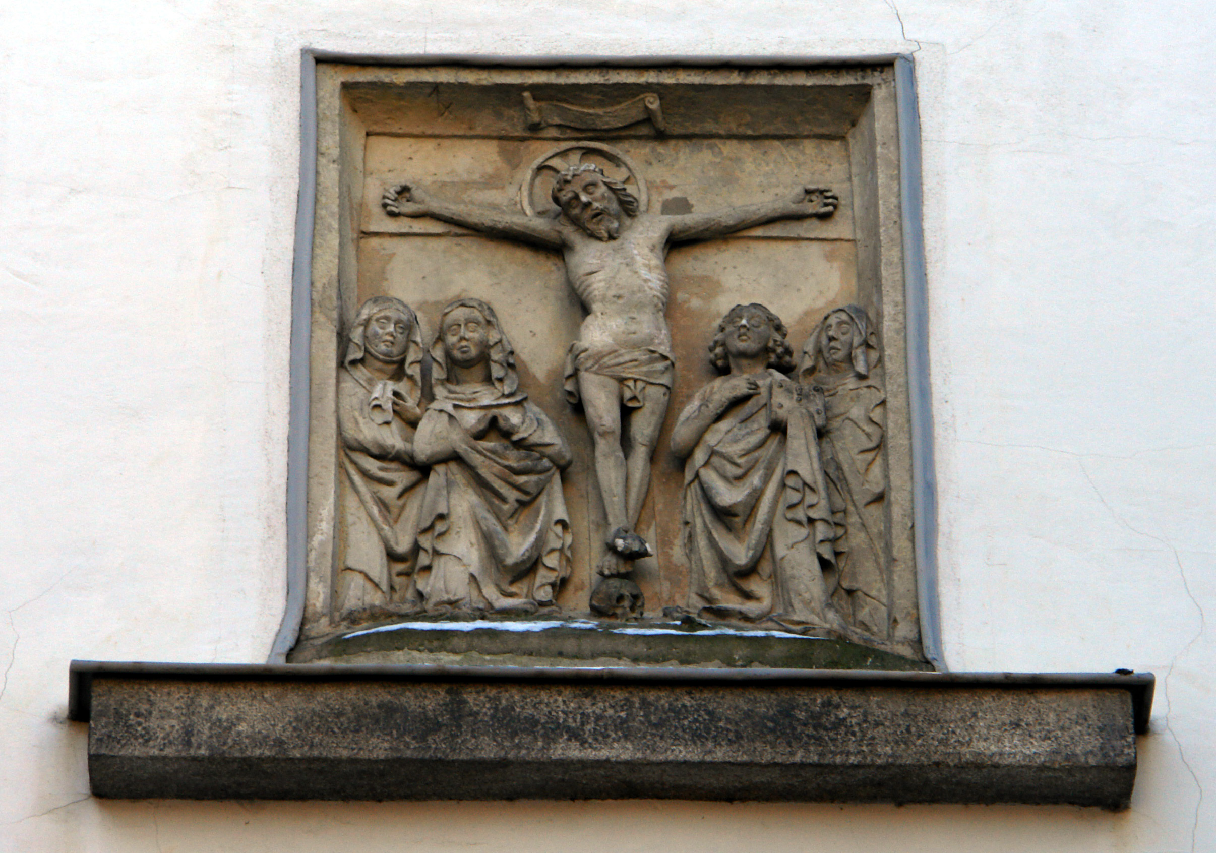 relief at Schülerturm in Bautzen.